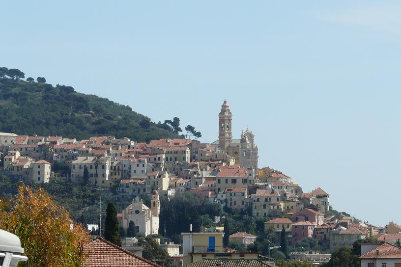 Foto varie di Cervo (IM), Liguria, Italia